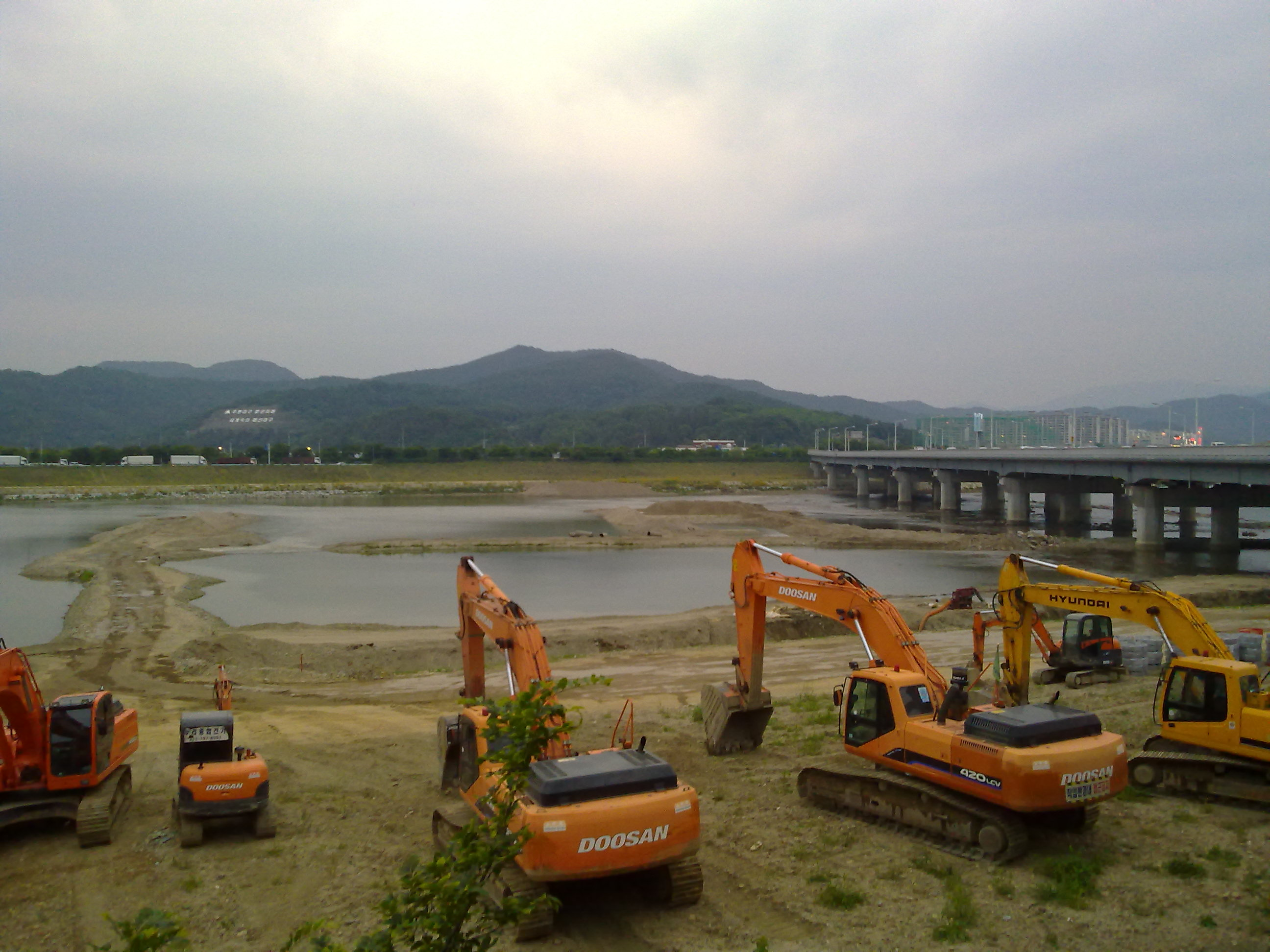 4대강정비사업-금호강지류부분